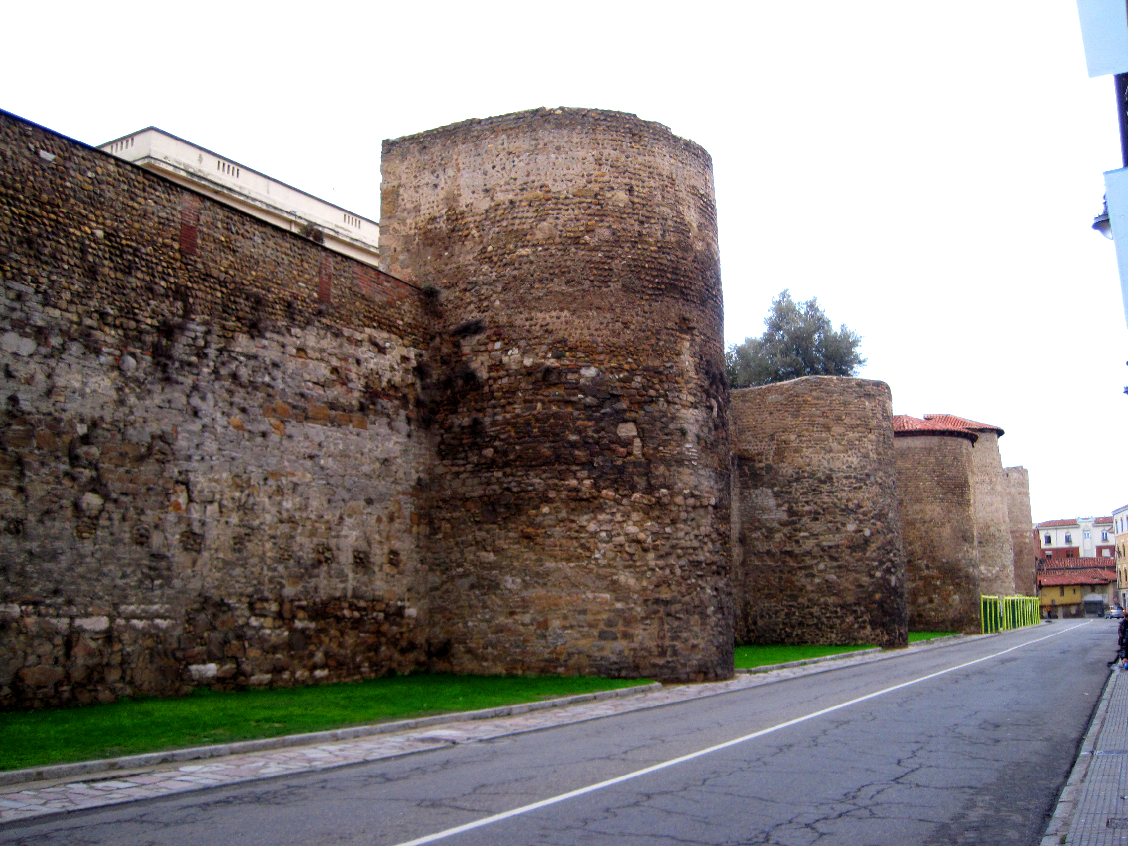 Vista de algunos de los cubos de la muralla de la ciudad de León (España).